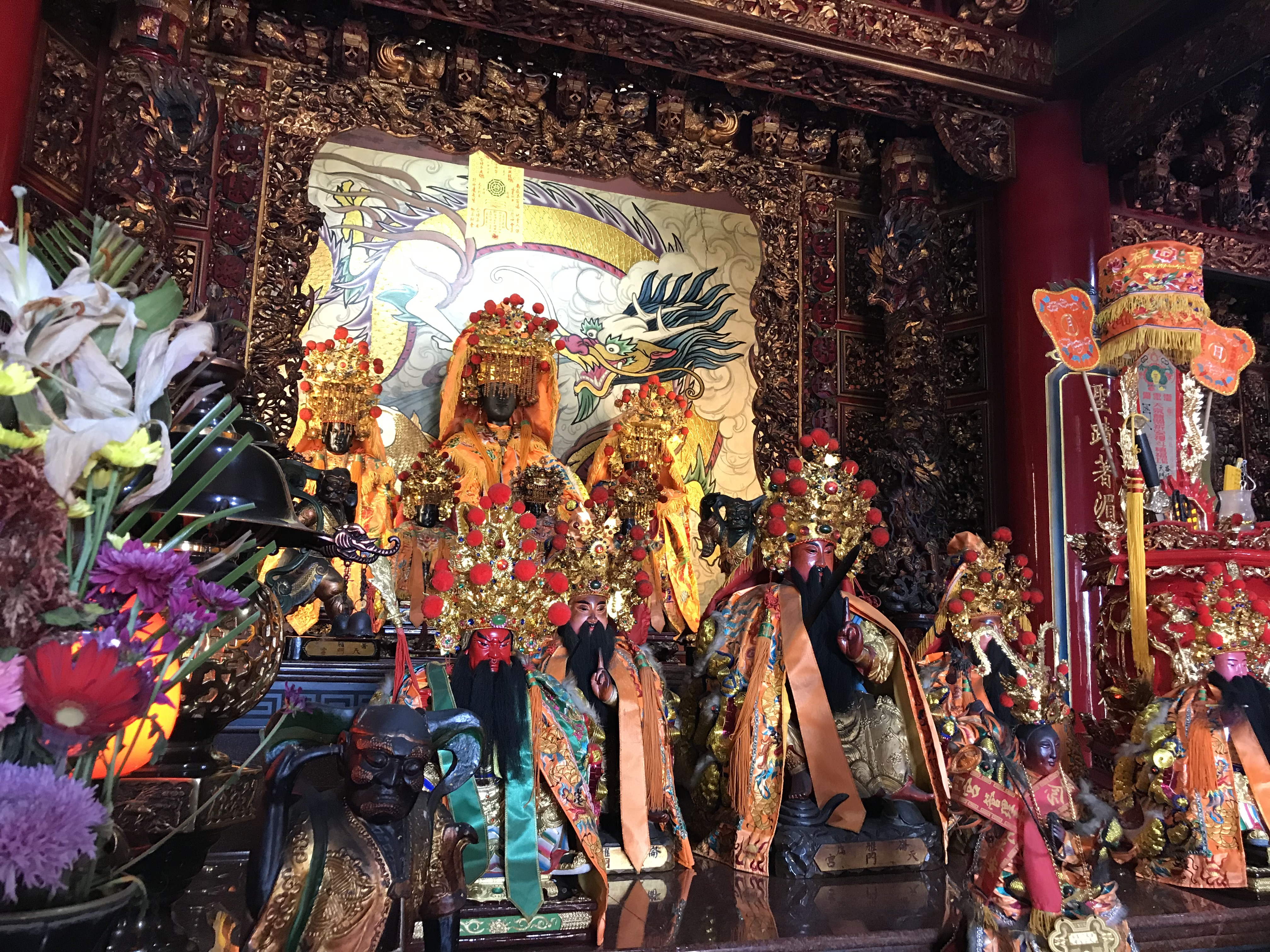 中文（台灣）: 崙仔庄天門宮崙雅大媽等神像